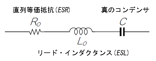 コンデンサの等価回路のひとつ。実際のコンデンサにある等価直列抵抗と等価直列インダクタンスを示している。漏れ電流については考慮していない